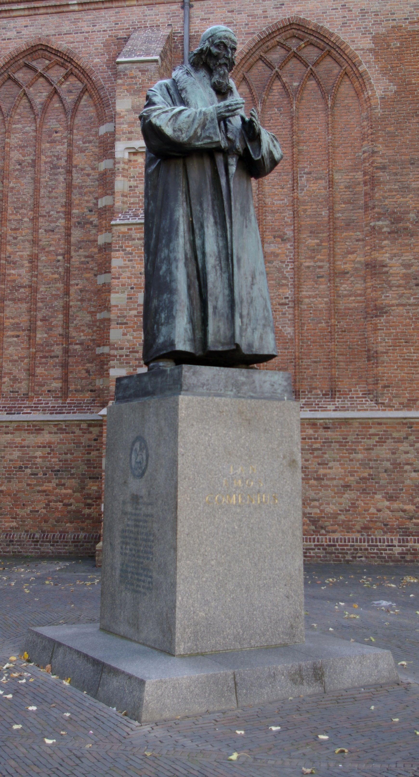 Comenius-Denkmal in Naarden, Niederlande